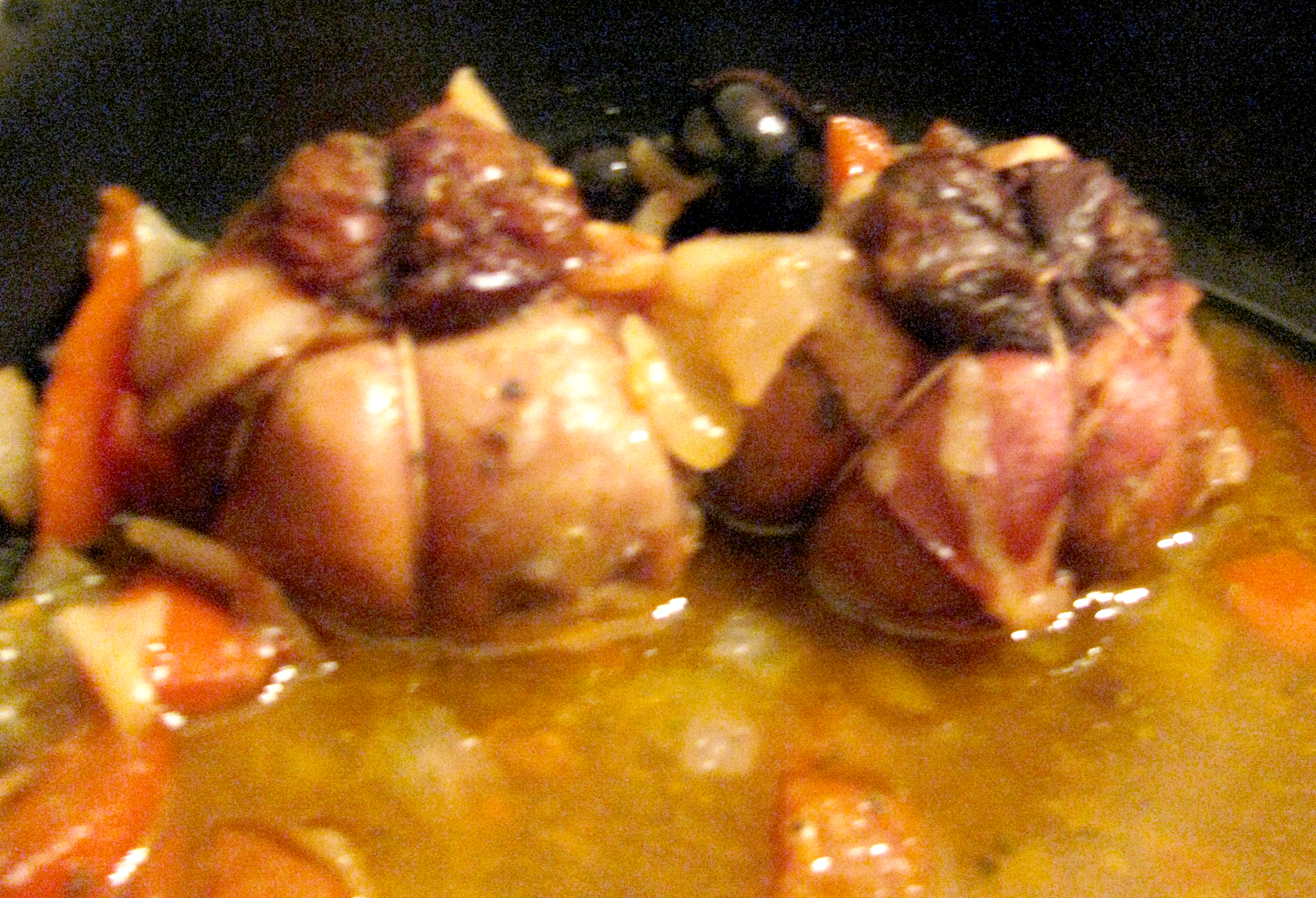 Paupiettes de lapin aux pruneaux